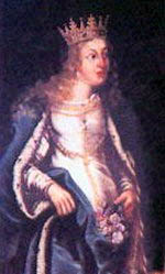 Elisabeth von Portugal